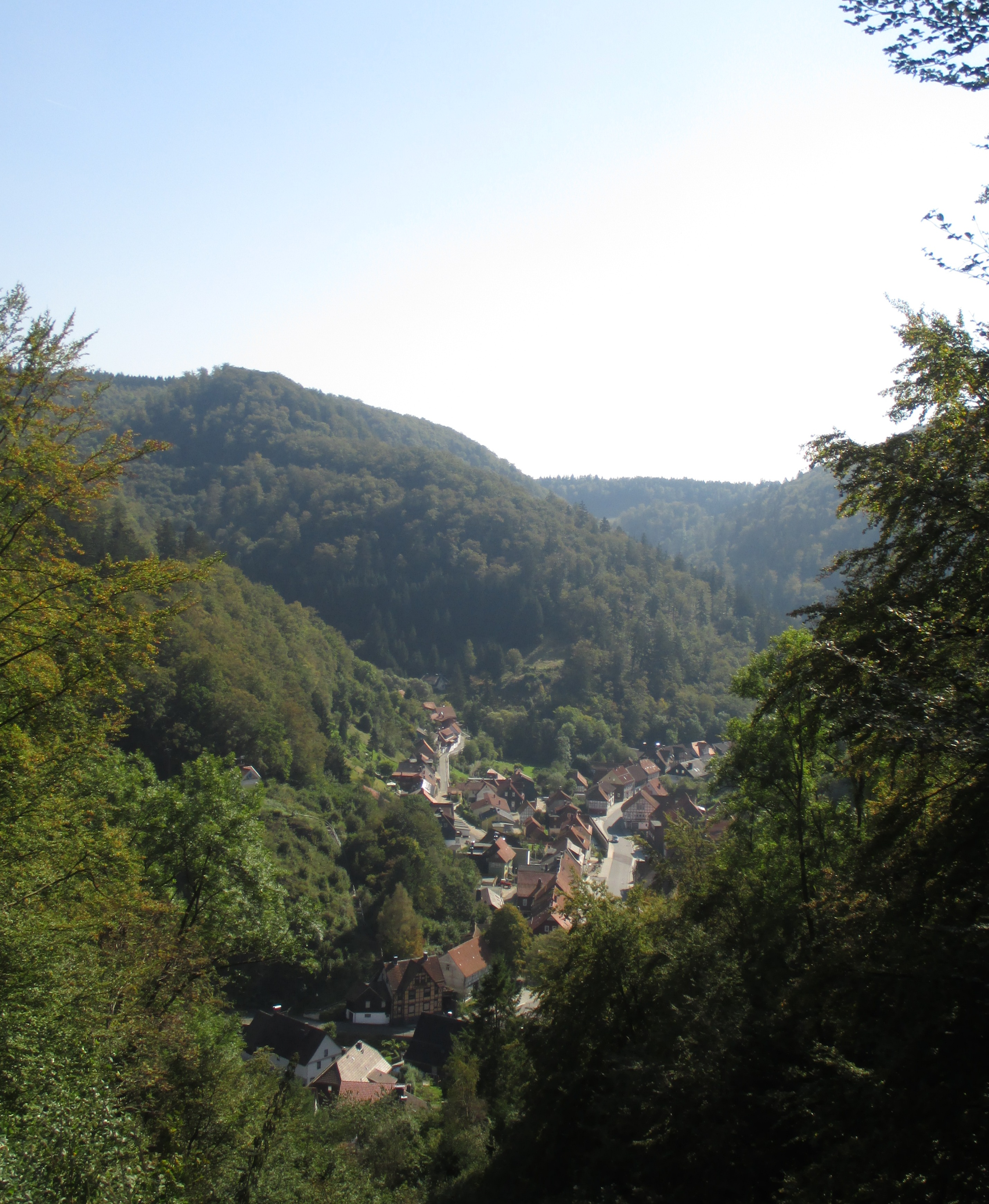 Blick vom Aussichtspunkt Pferdchen bei Zorge